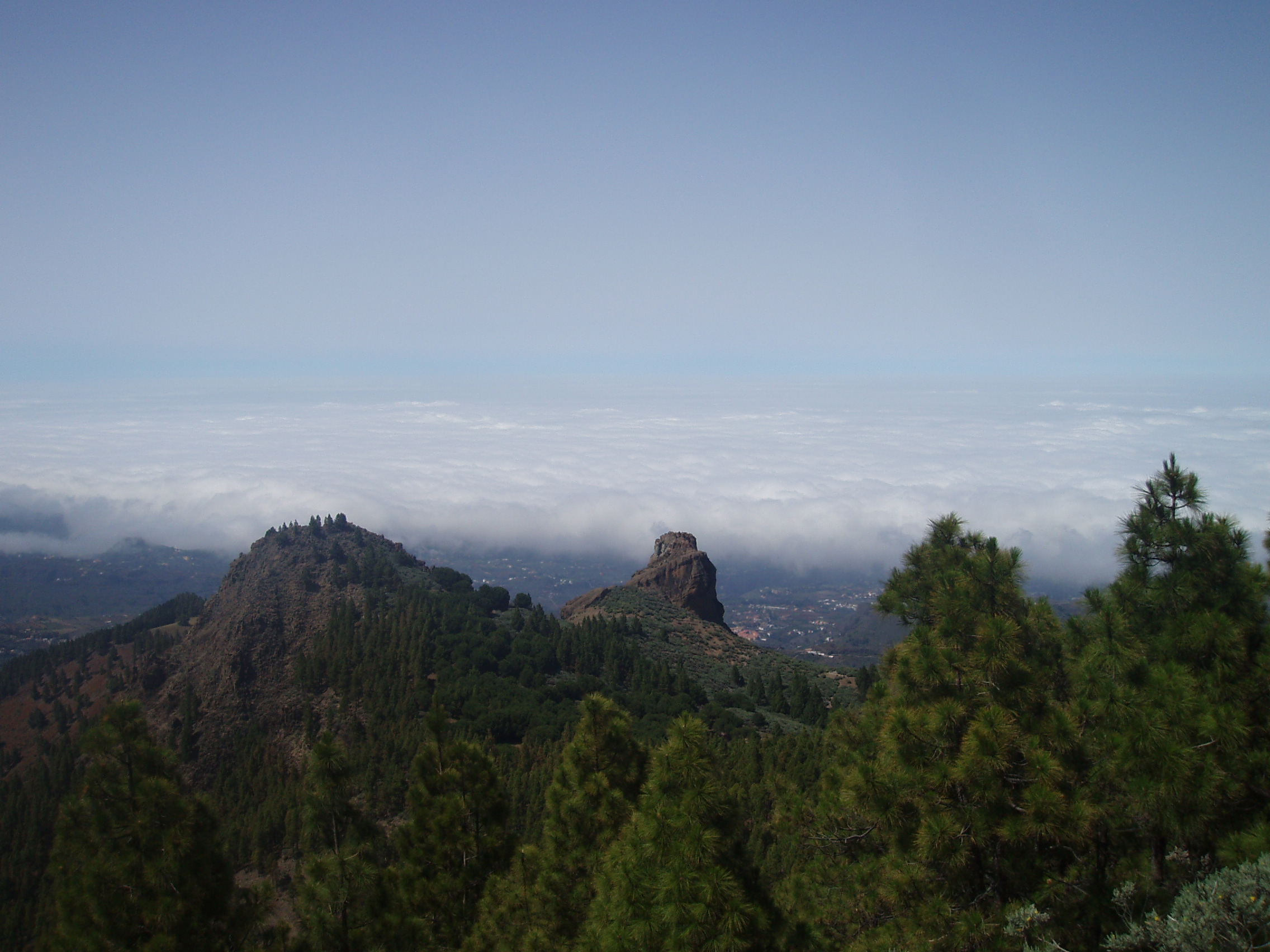 Roque de origen volcánico en las cumbres de Gran Canaria